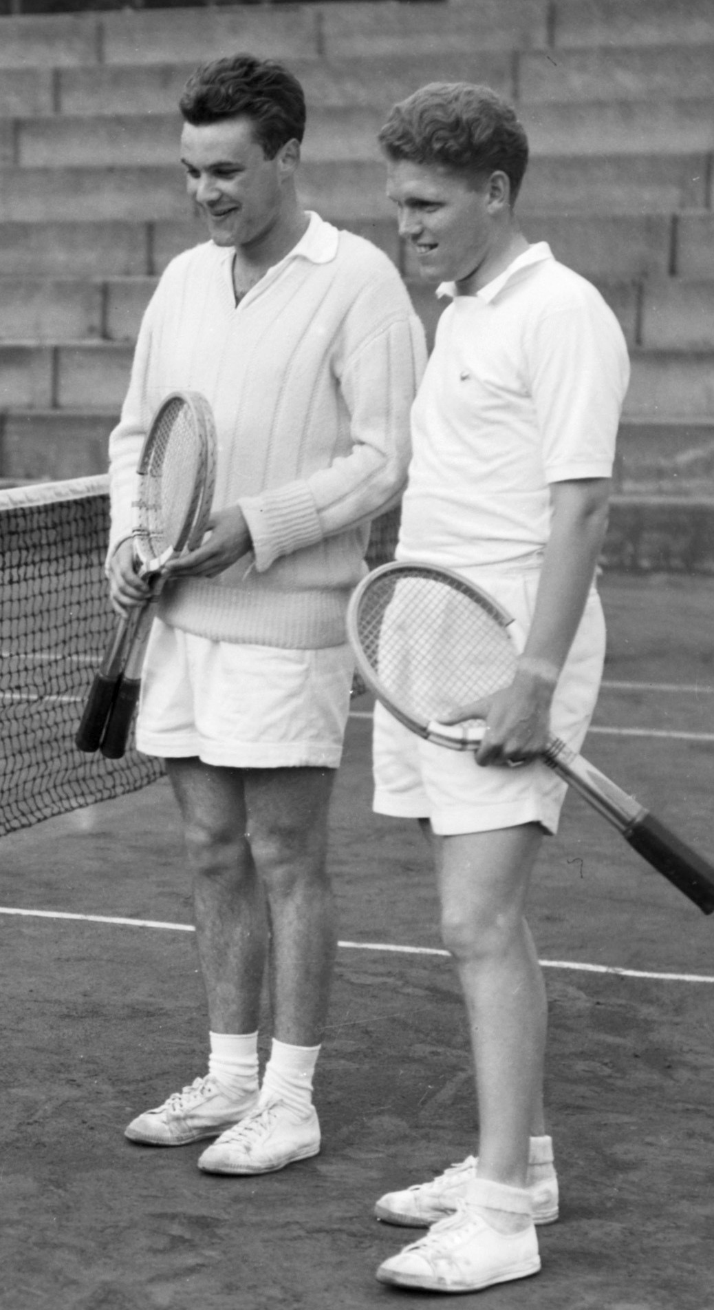 Tennis. Nederland tegen Noorwegen. Scholkieksh, Dehnert en van Dalsum